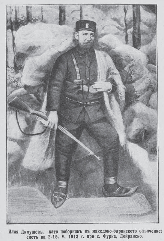 Iliya Dimushev